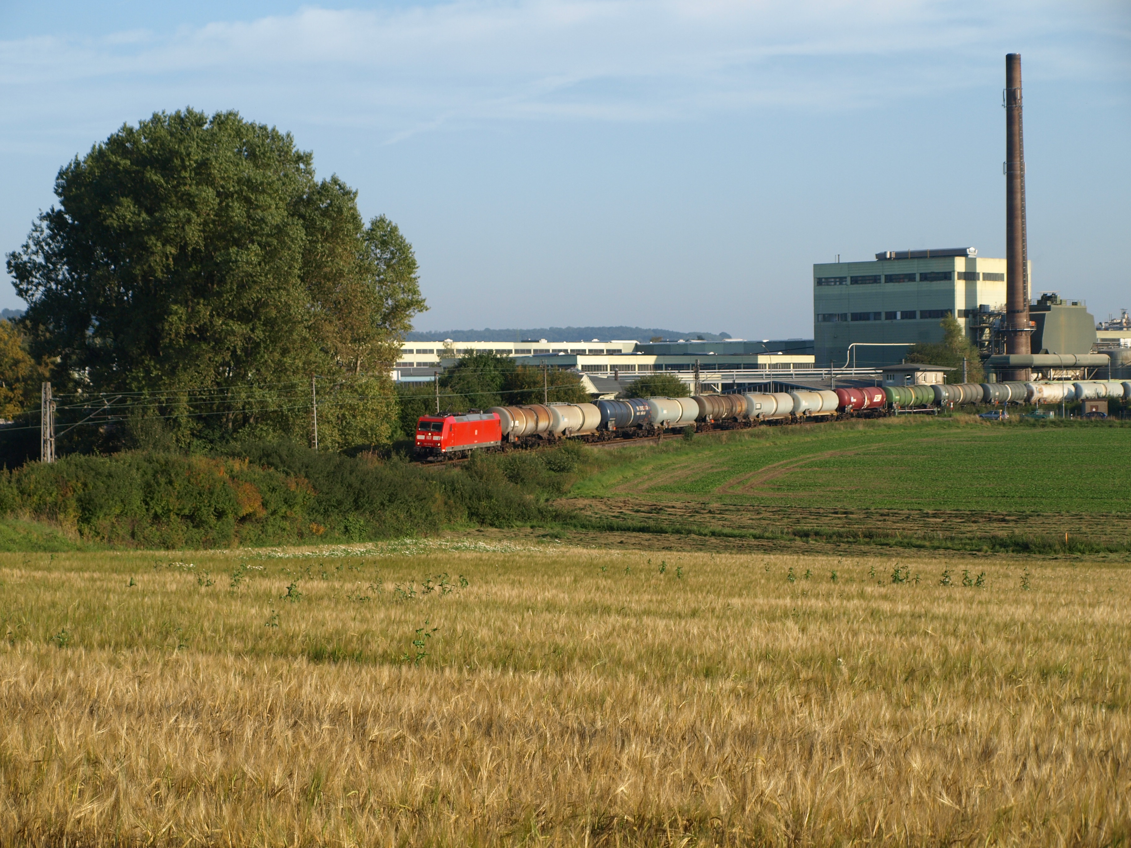 Am 26.09.08 wurde der nur bei Bedarf - dies aber recht häufig - verkehrende Kesselwagenzug DGS 64000 Kassel - Holthausen zur Abwechslung von einer 145 der DB Schenker im Dienst der RBH Logistics GmbH bespannt. In der Vergangenheit waren es zumeist RBH-eigene 145 oder von DB Regio geliehene 143-Doppeltraktionen. Hier hat dieser Zug soeben Horn-Bad Meinberg durchfahren und wird in Remmighausen der NWB 81512 nach Altenbeken begegnen.